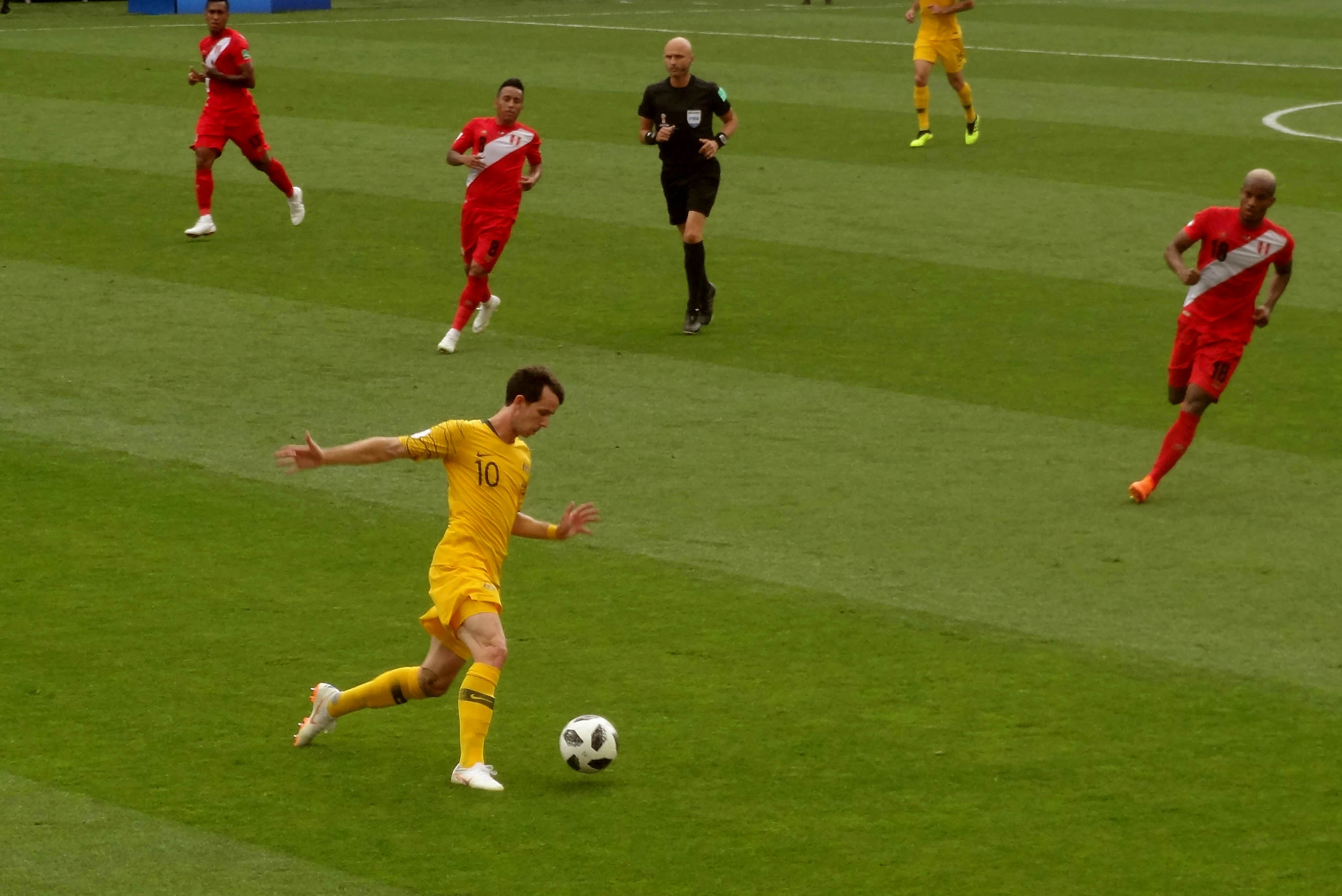 Робби Томас Круз (англ. Robbie Thomas Kruse; 5 октября 1988, Брисбен, Австралия) — австралийский футболист, нападающий клуба «Бохум» и сборной Австралии. Участник чемпионата мира 2018 года.